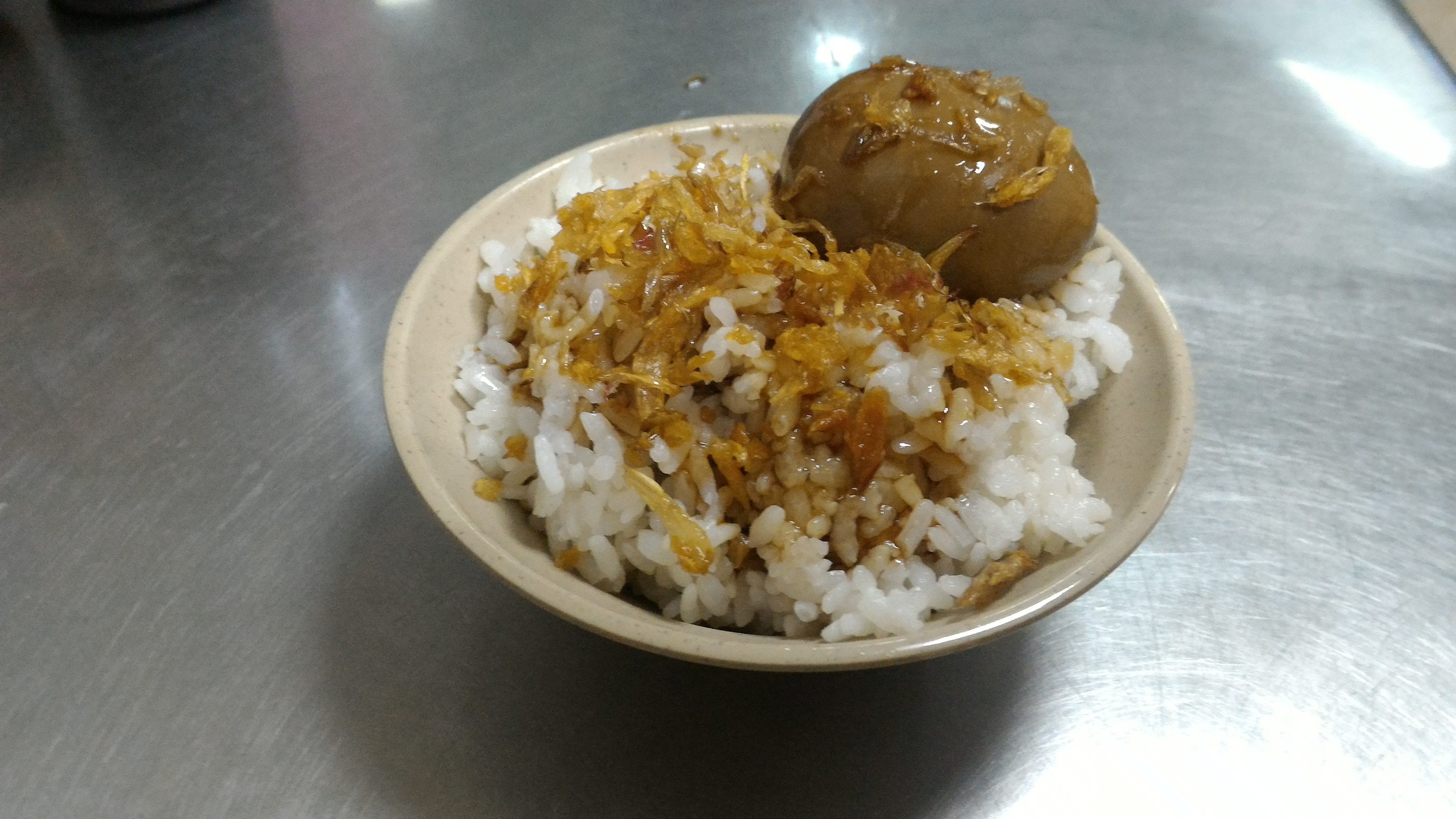 Bân-lâm-gú: 加叫一粒滷卵的豬油攪飯，佇臺灣景美愛買百貨後壁遐的一間店仔翕的。